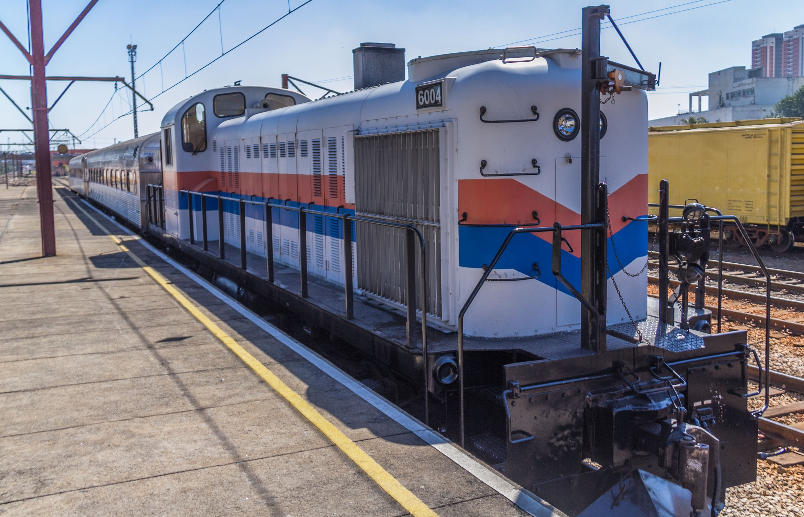 Estaço ferroviária de Jundiai e expresso turístico da CPTM